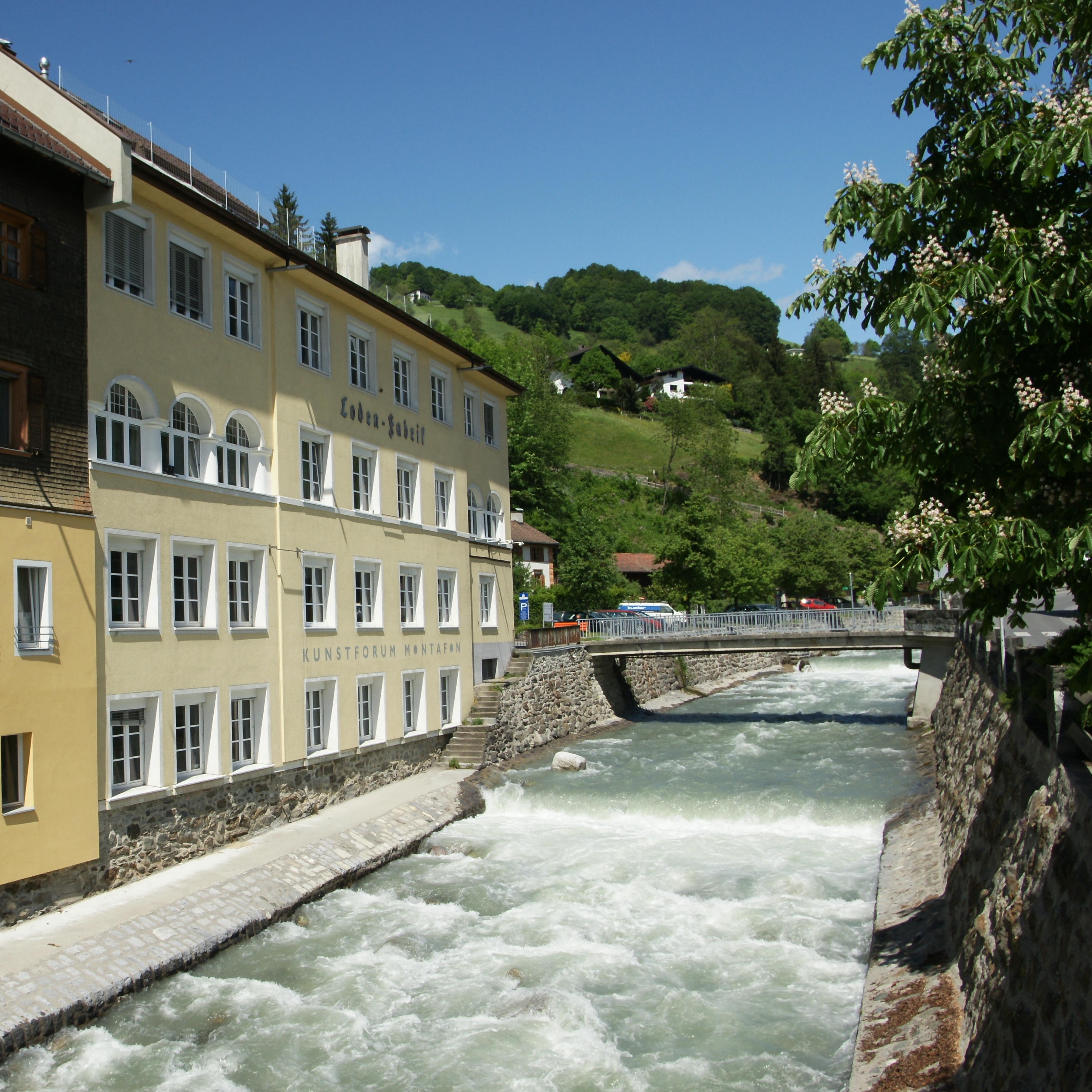 Lodenfabrik, Architekt Hanns Kornberger, am Litzbach in Schruns